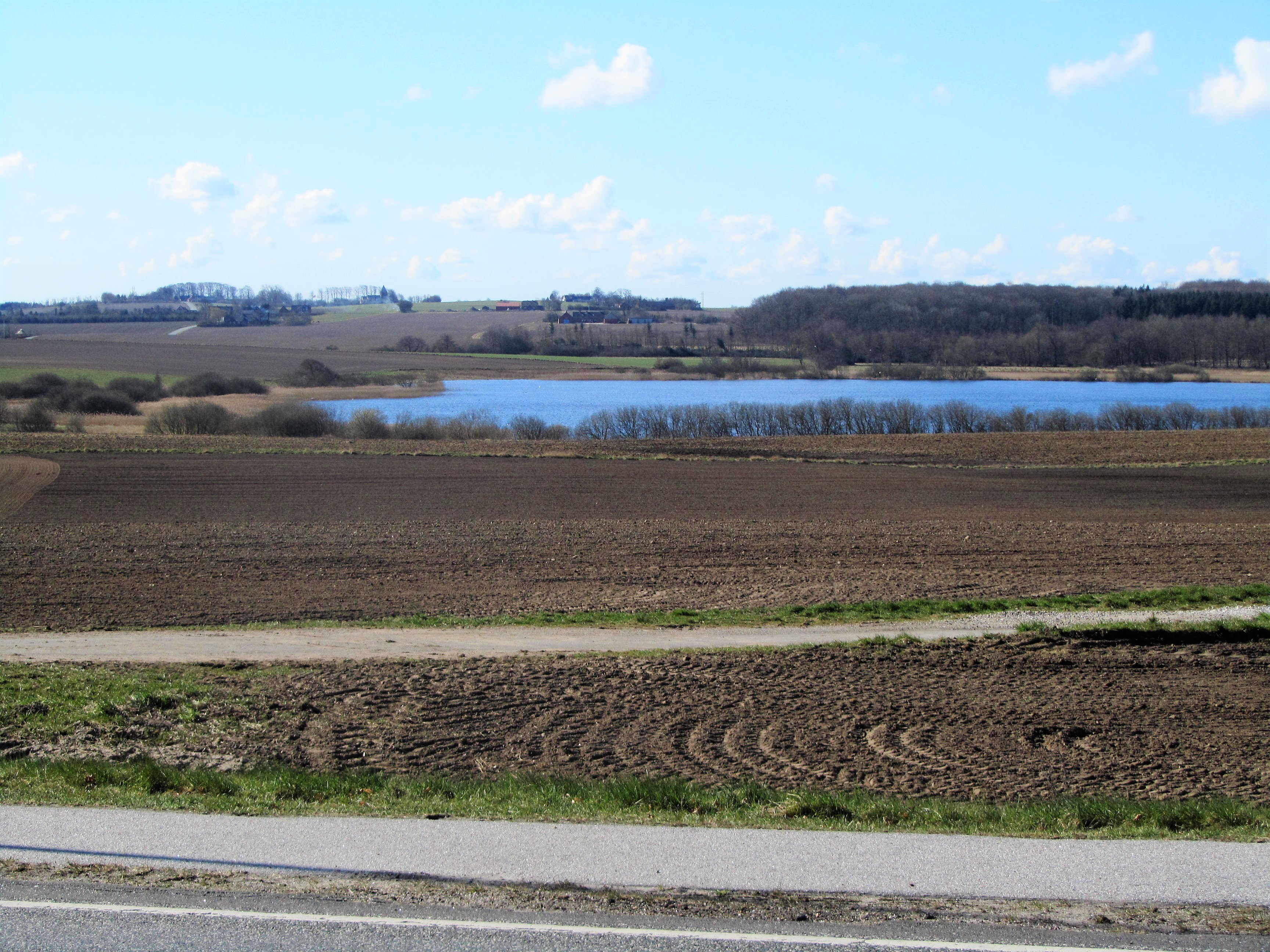 Lading Sø Østenden set mod syd